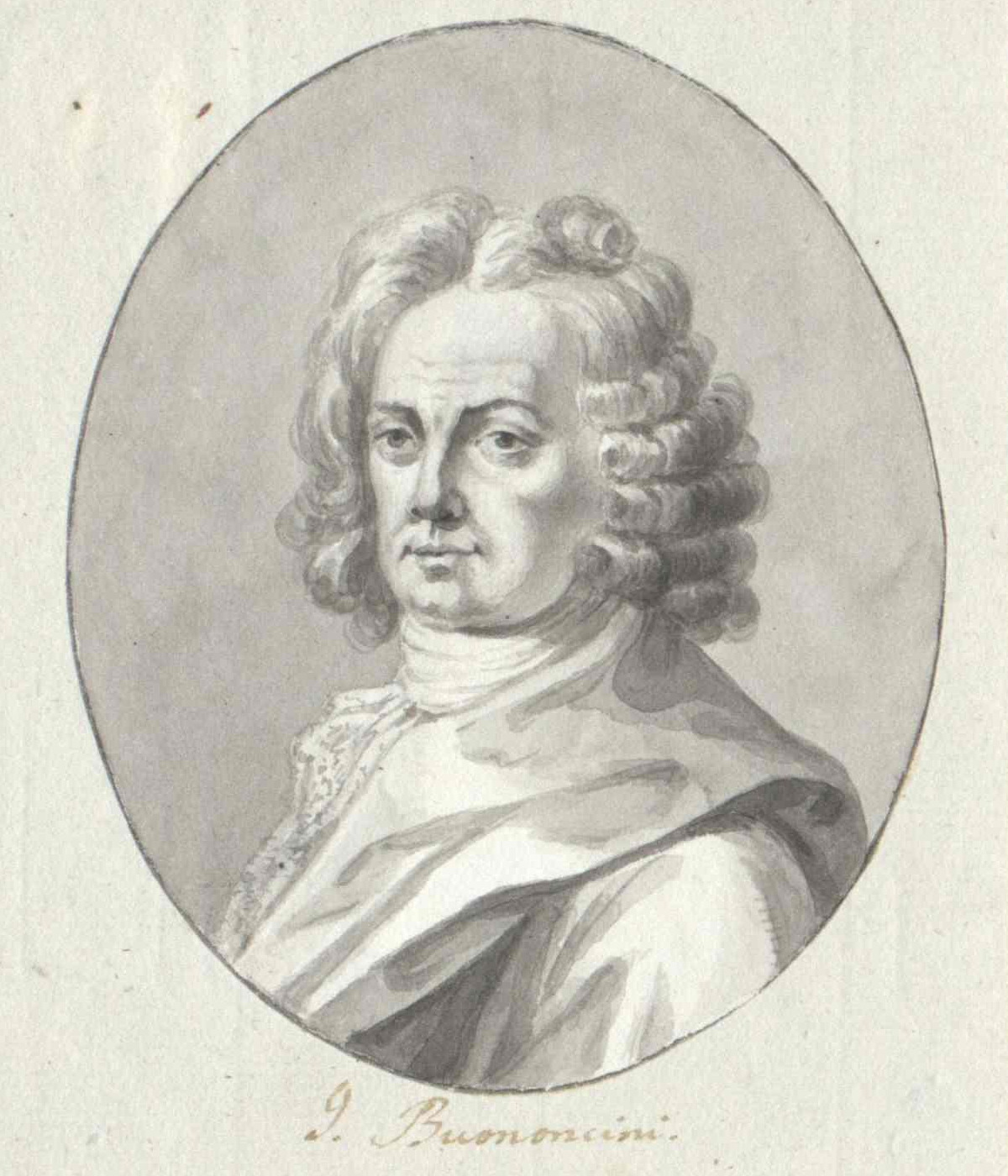 Depicted person: Giovanni Bononcini